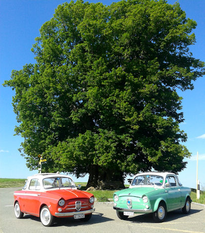 Kleinfahrzeuge mit auffallend eleganter Note sieht man nicht alle Tage. Darum ist der ‚Weinsberg 500’ genau das richtige Automobil für kluge Individualisten, die auch von einem Kleinwagen erwarten, dass er sich in jeder Beziehung aus der Masse heraushebt.